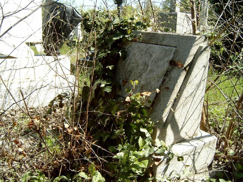 Szendrey Zsigmond (Szatmárnémeti, 1879. február 28. – Balatonfenyves, 1943. május 28.) etnográfus. Szendrey Ákos apjának sírja Budapesten. Új köztemető: 16/2-2-12